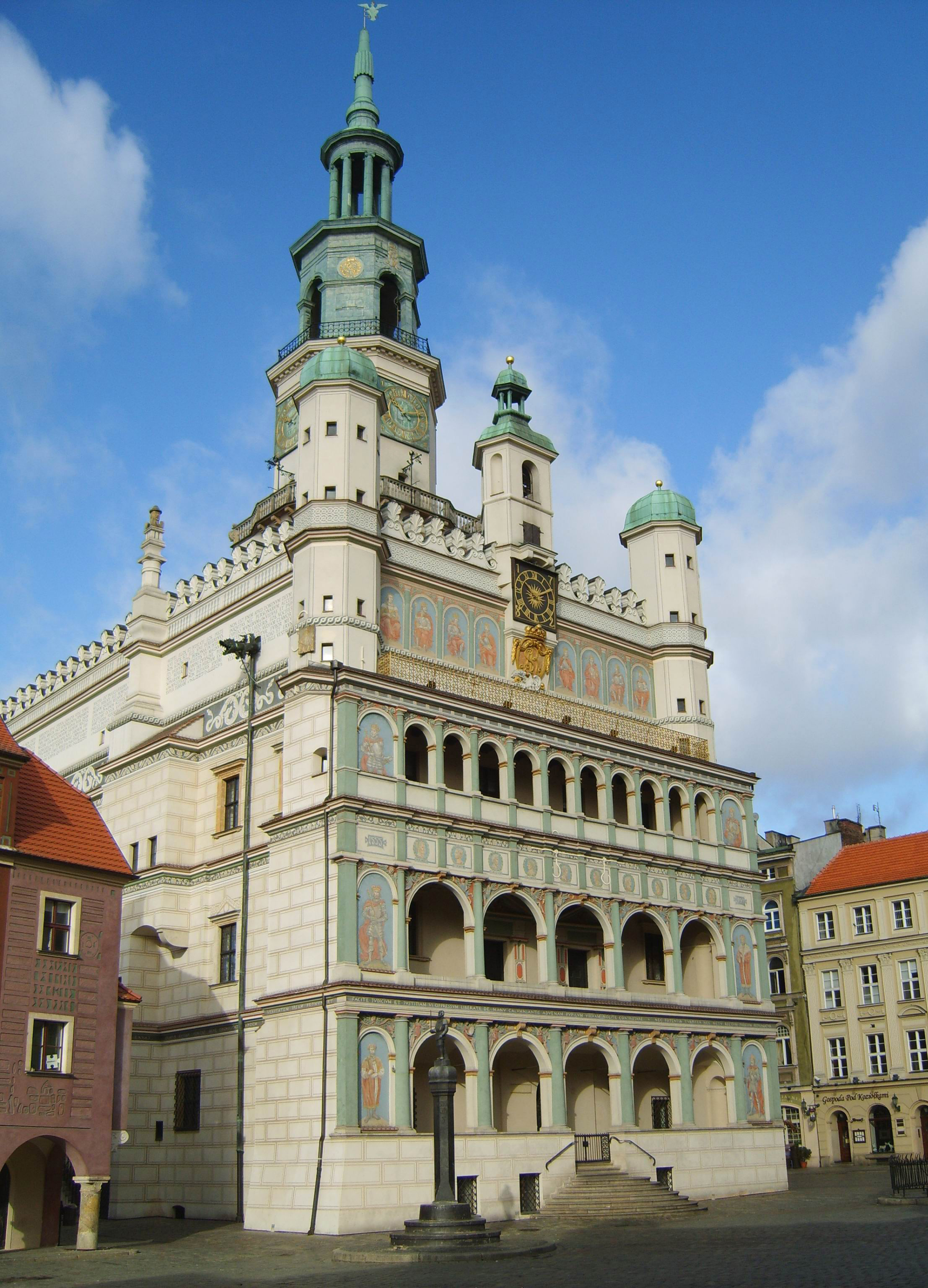 Ratusz w Poznaniu